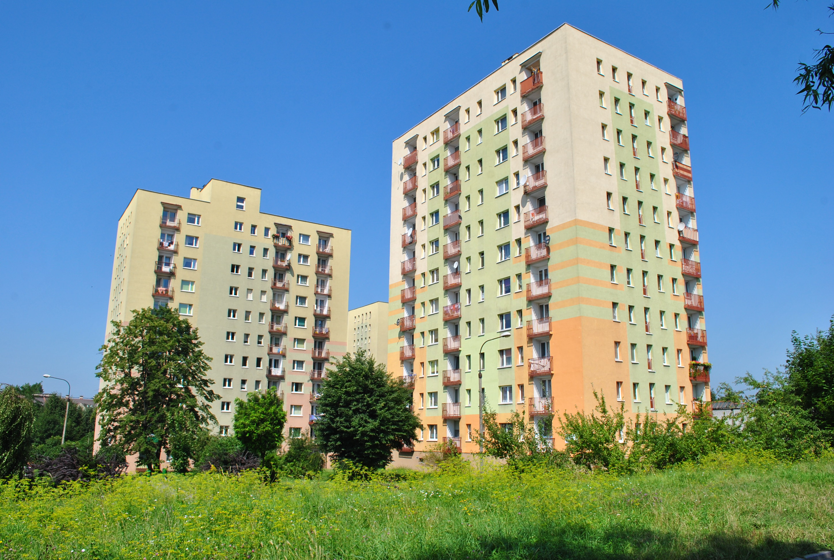 Katowice - Brynów. Osiedle mieszkalne przy ul. Wodospady